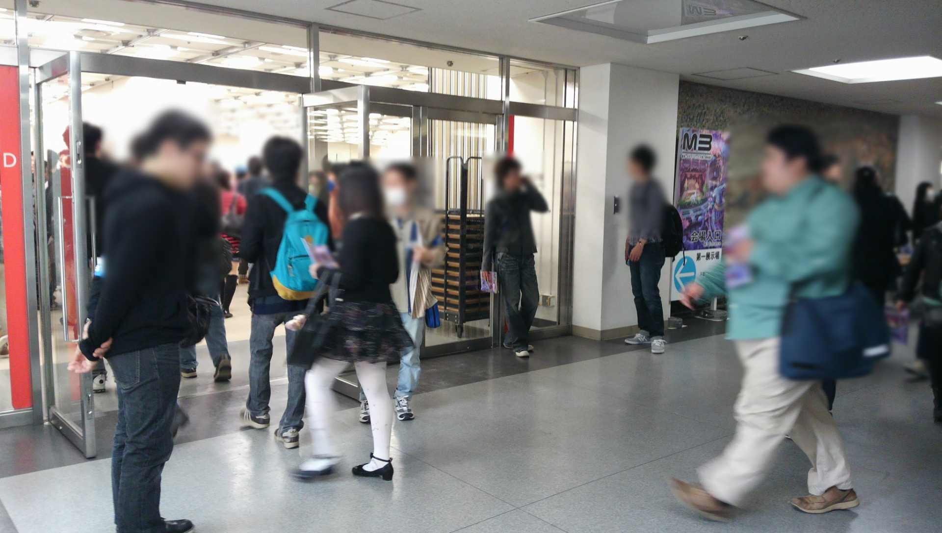 2013年4月29日に開催された「M3」の模様。撮影場所は、東京流通センター第一展示場2階の入り口前。